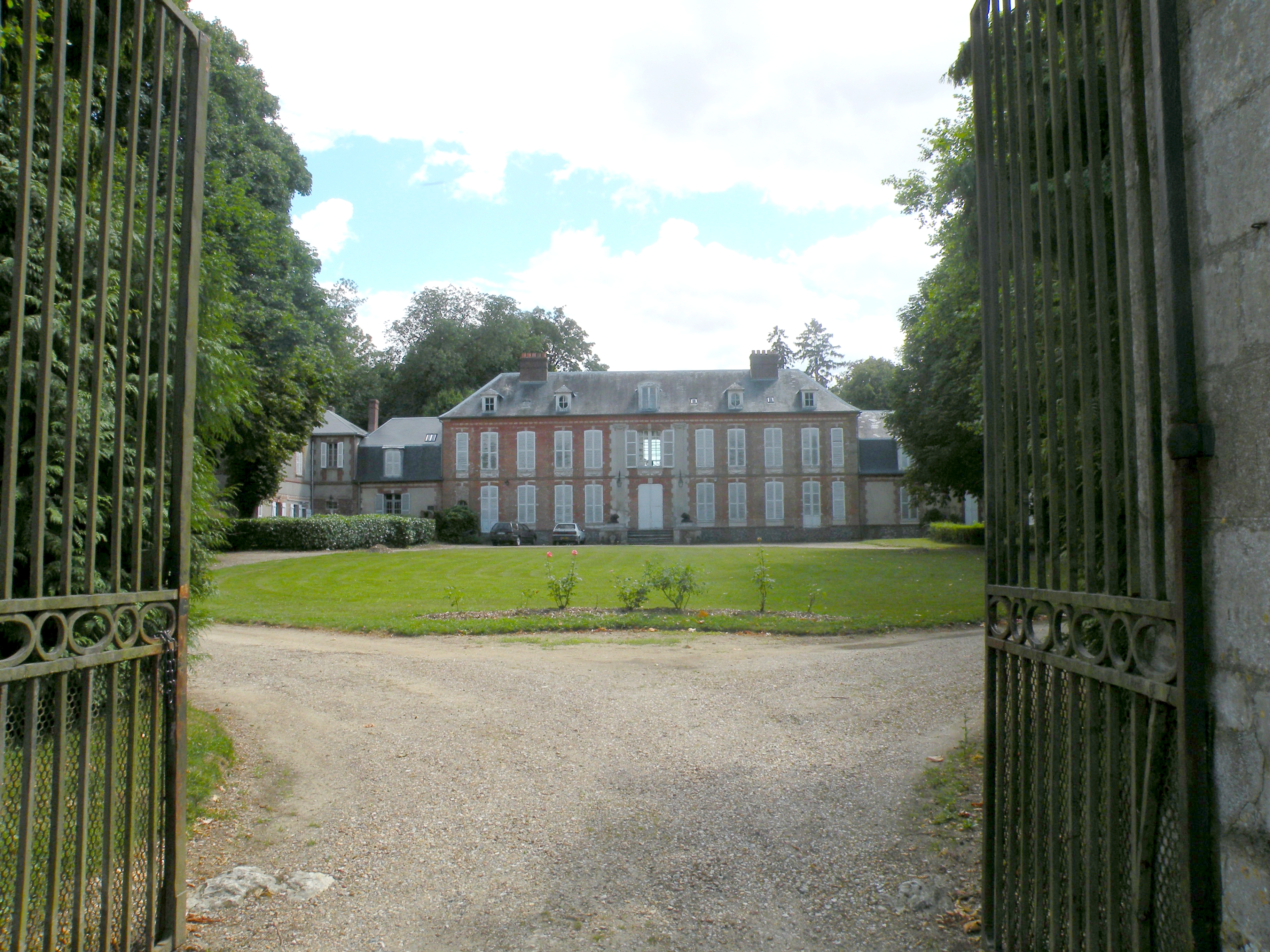 château de Montherlant (Oise) du XVIIe siècle ayant appartenu à Henry Millon de Montherlant (XVIIIe et XIXe siècles).